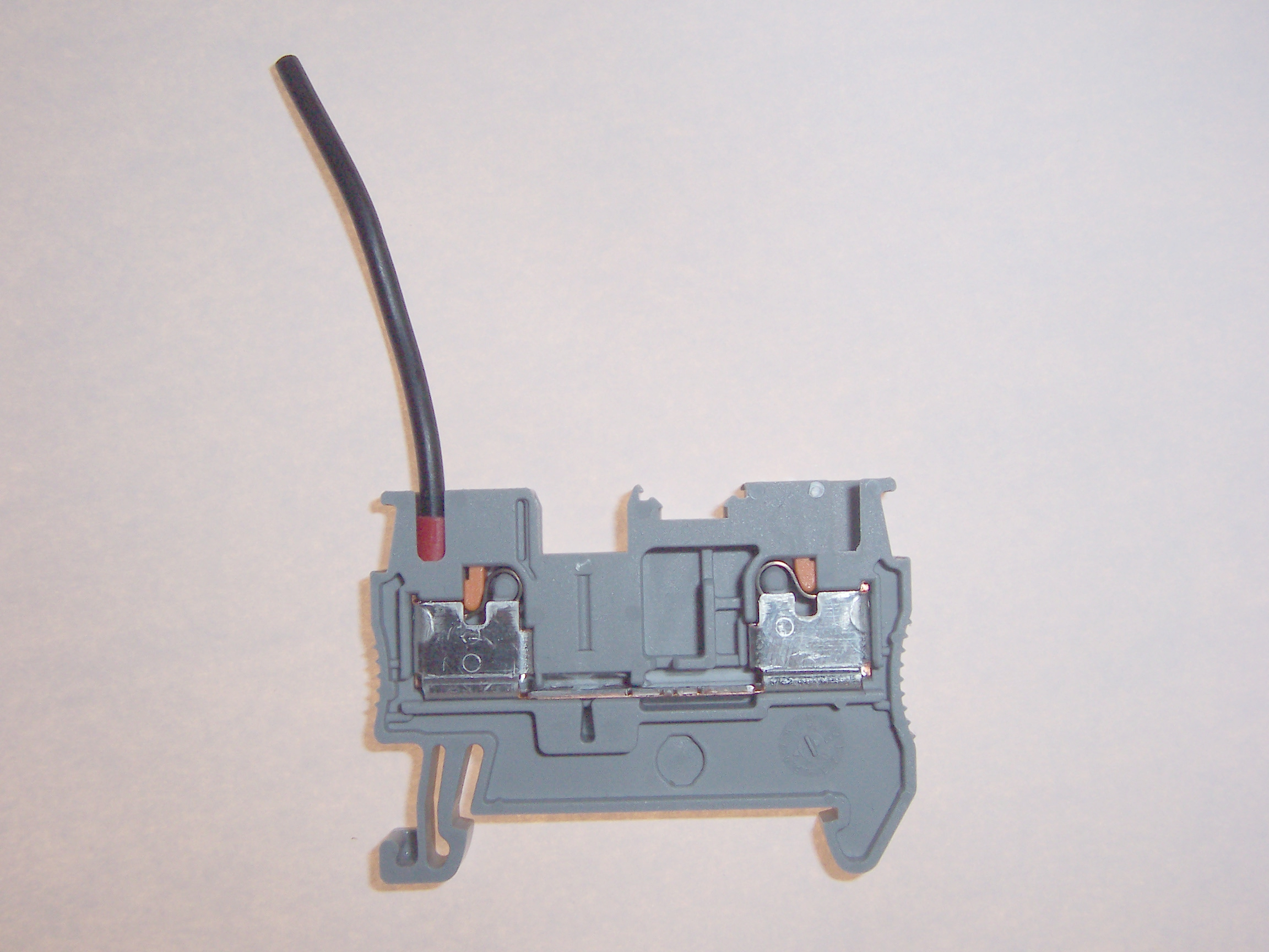 Przekrój złącza PIT (Push In Terminal)